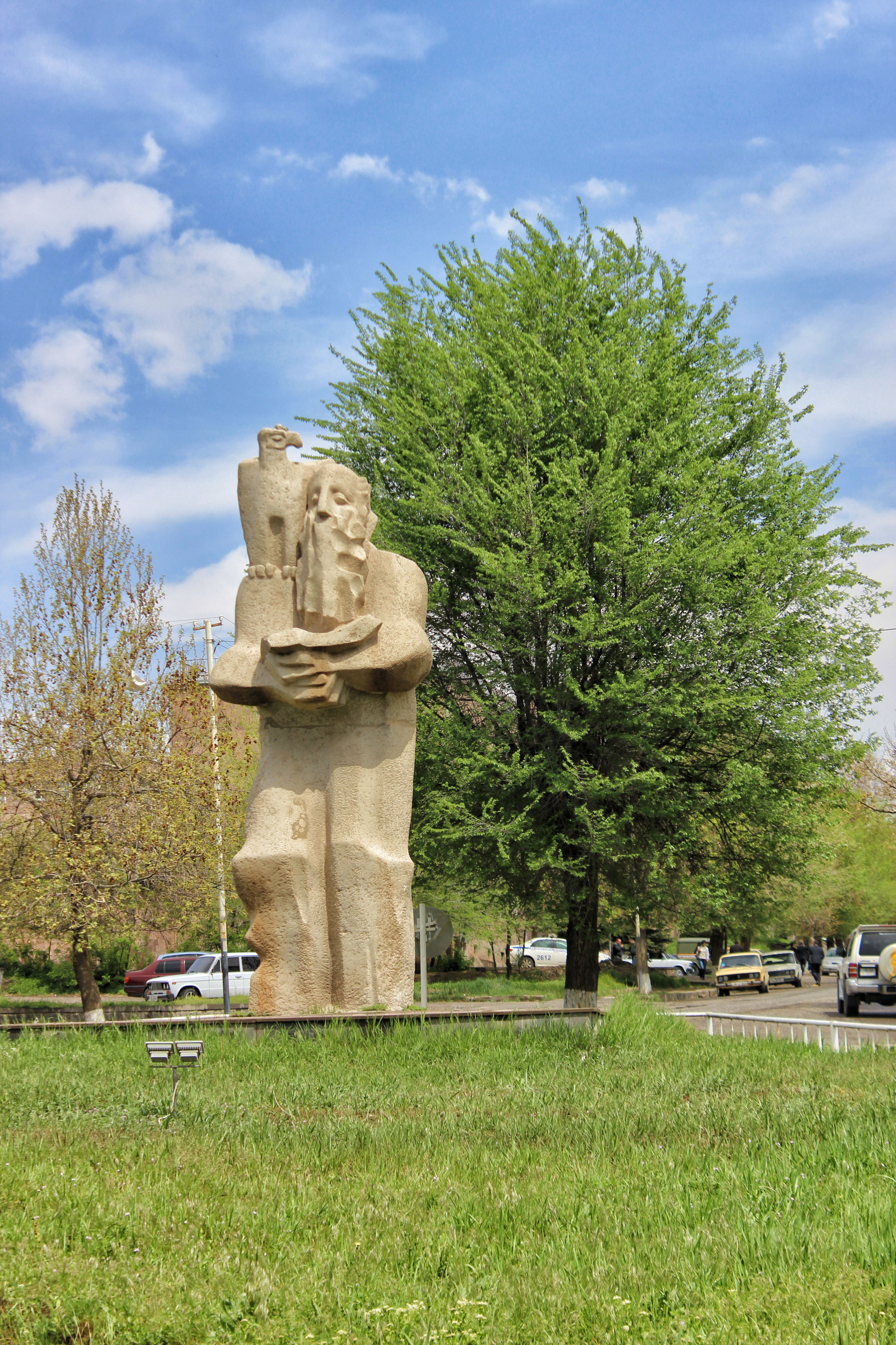 Հուշարձան Եսայի Նշեցու 1/10